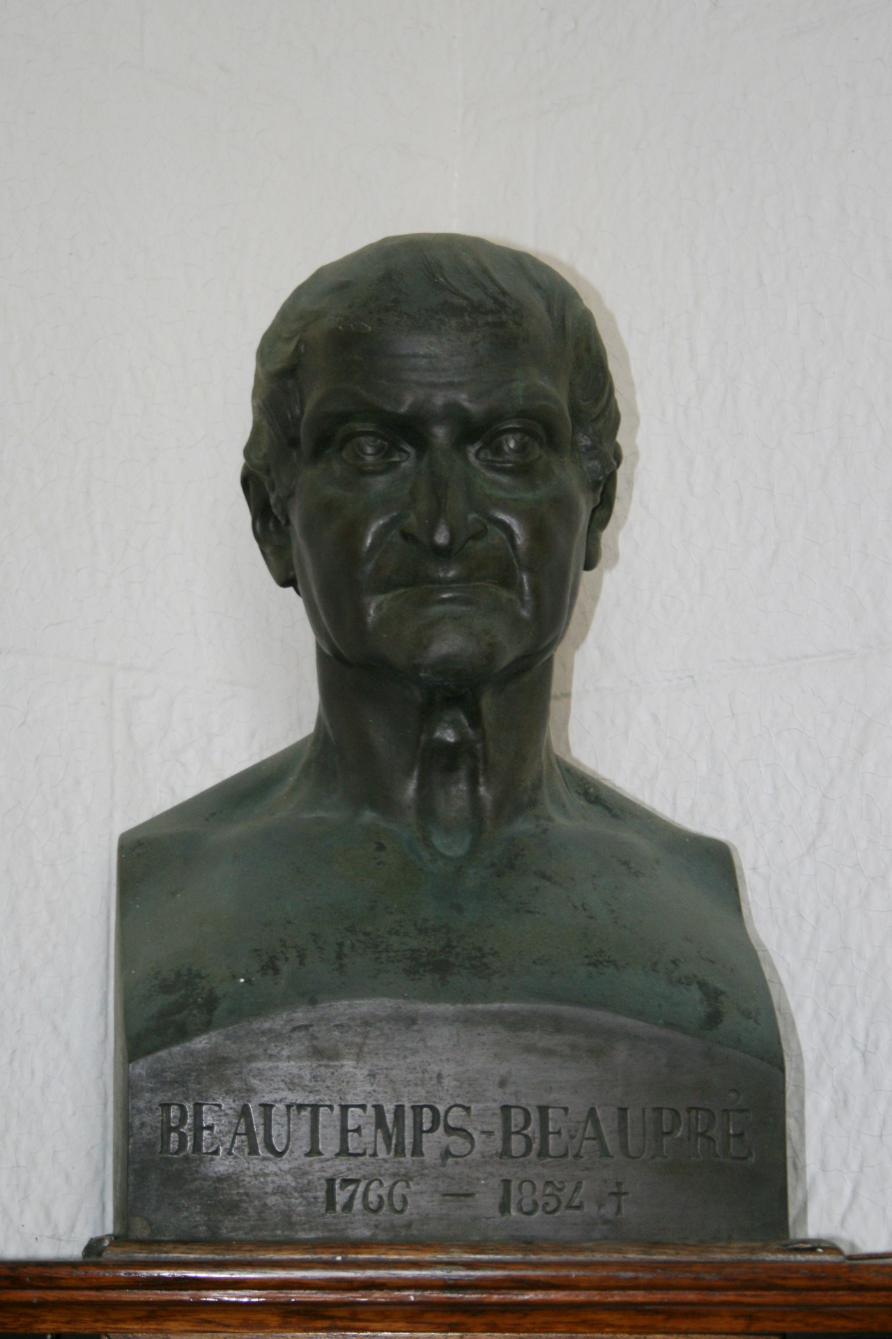 Buste de Beautemps-Beaupre dans le phare de Goulphar